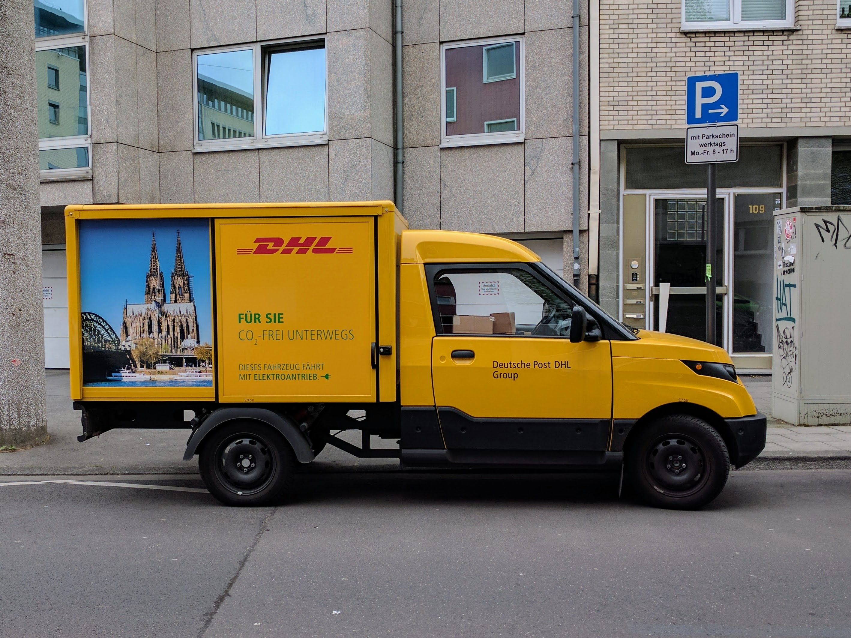 DHL Post StreetScooter in Köln